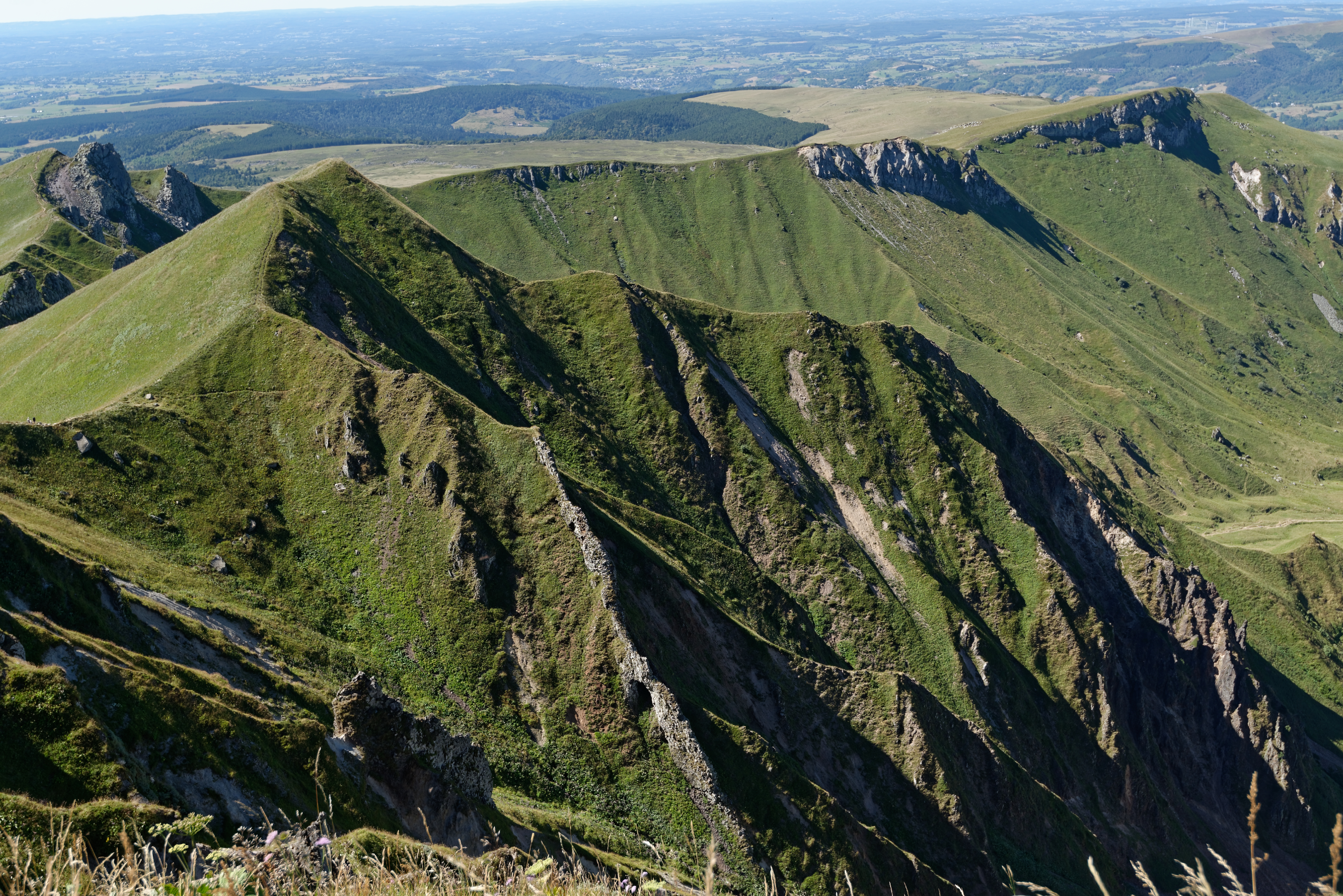 Vue depuis le Puy de Sancy vers le Pas de l'âne.